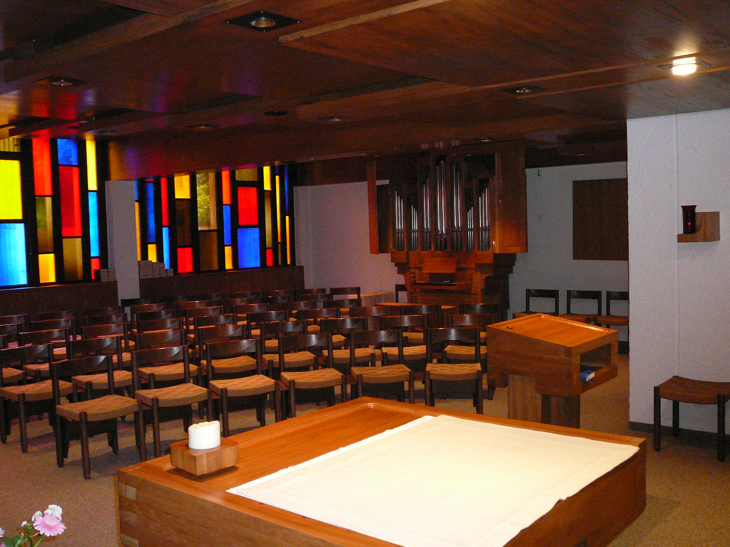 Römisch-katholische Kirche St. Gallus Zürich-Schwamendingen, Blick vom Altarbereich zur Orgel